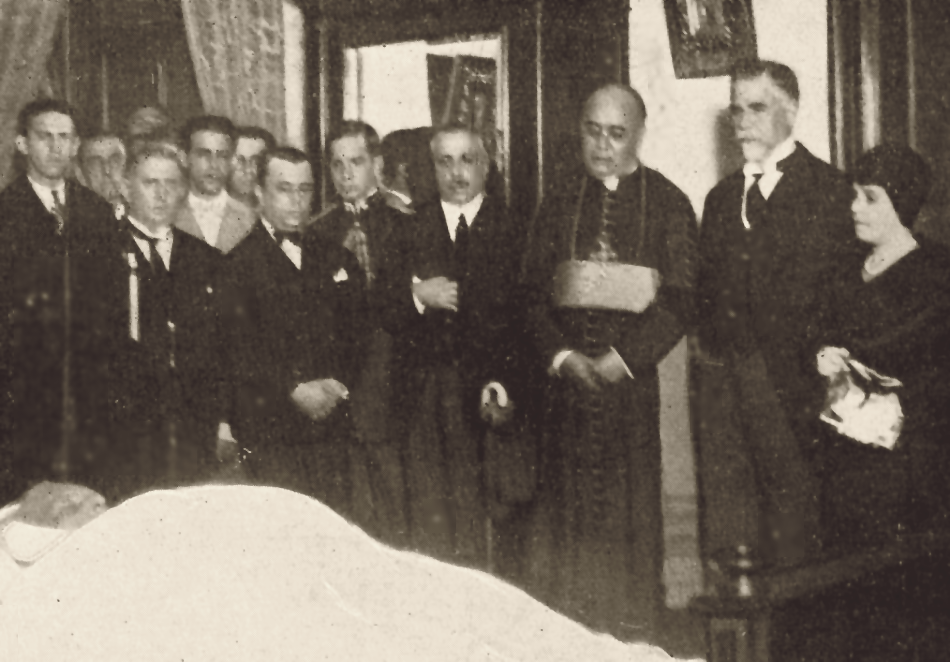 Morte e translado do corpo do Cardeal Arcebispo do Rio de Janeiro em abril de 1930, Joaquim Arcoverde de Albuquerque Cavalcanti. Visita do Presidente brasileiro Washington Luís e autoridades.